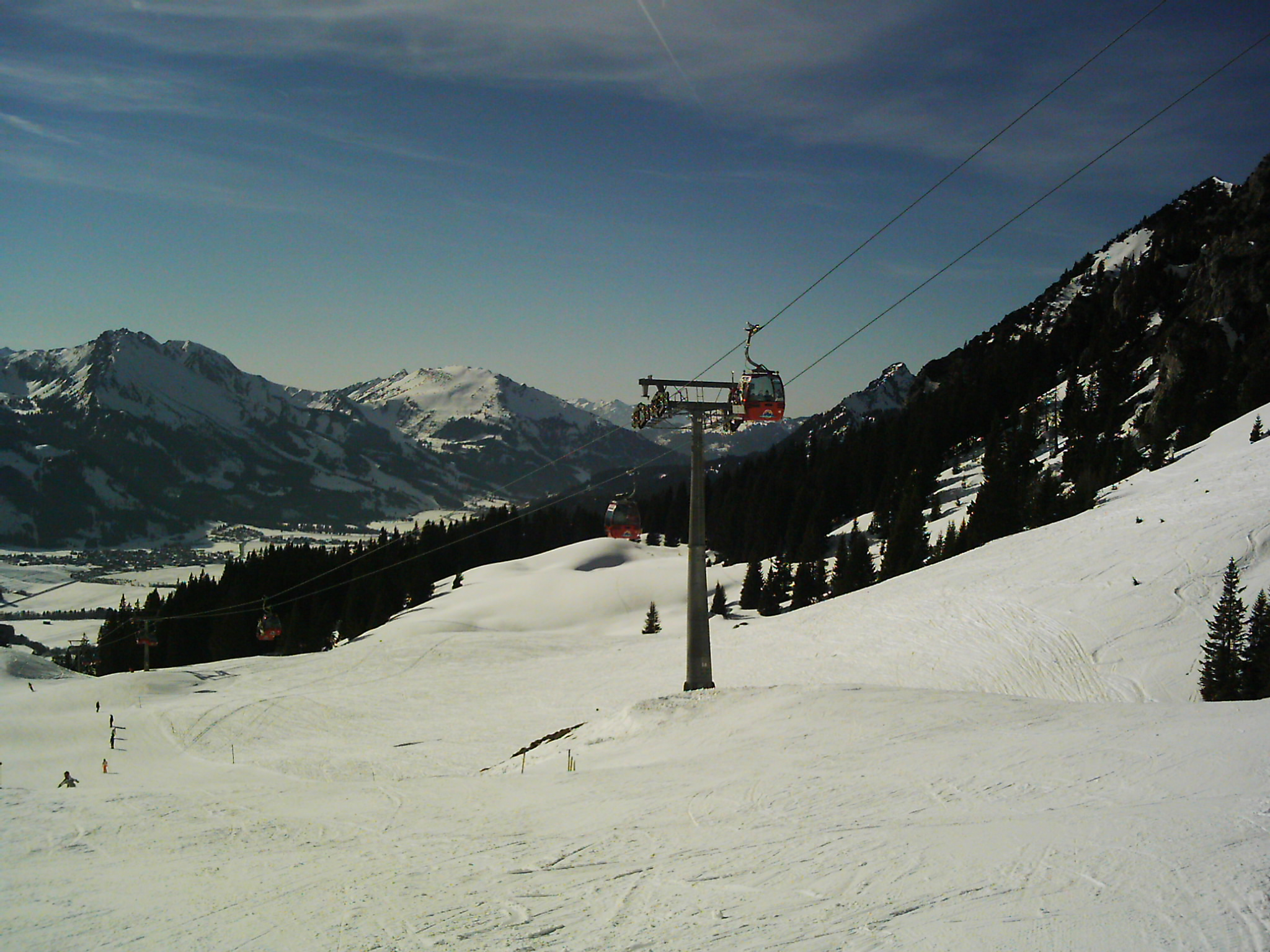 Bergbahn Füssener Jöchle in Grän, Tannheimer Tal, Tirol